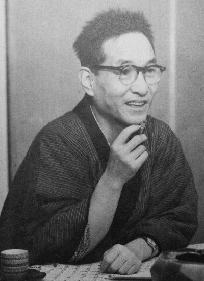 尾﨑士郎